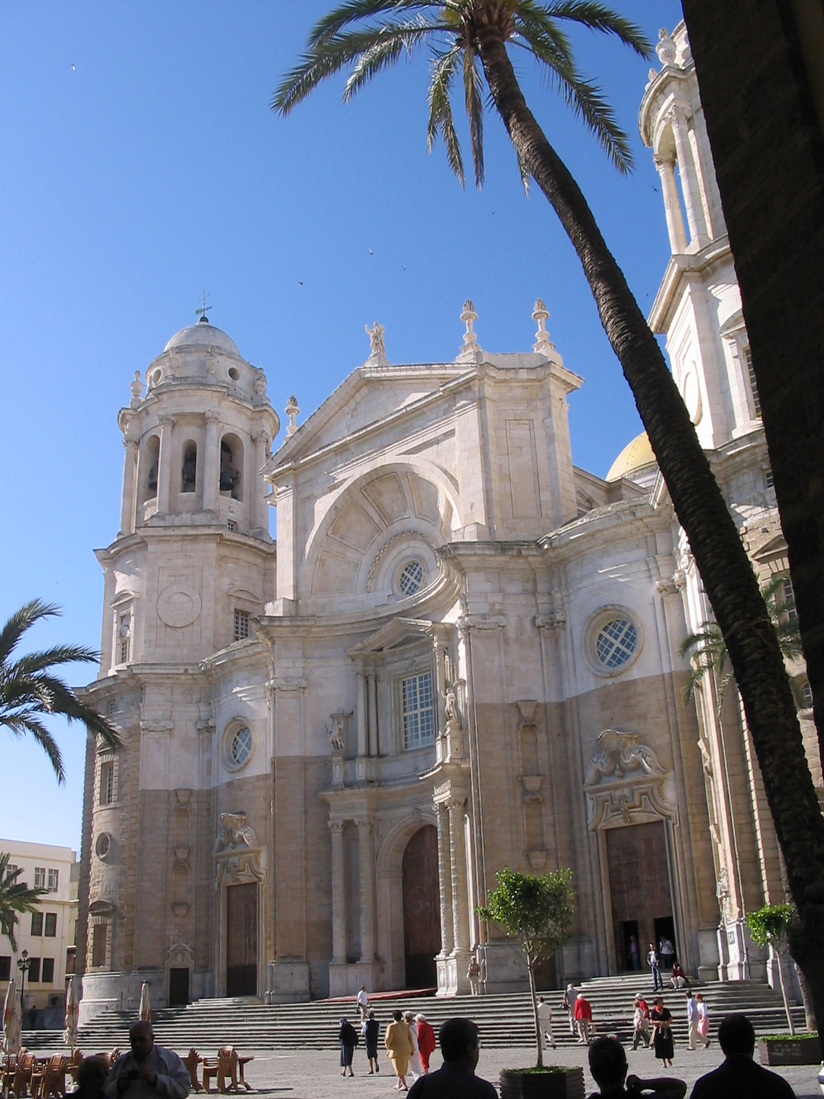 Cathédrale de Cadix, Espagne